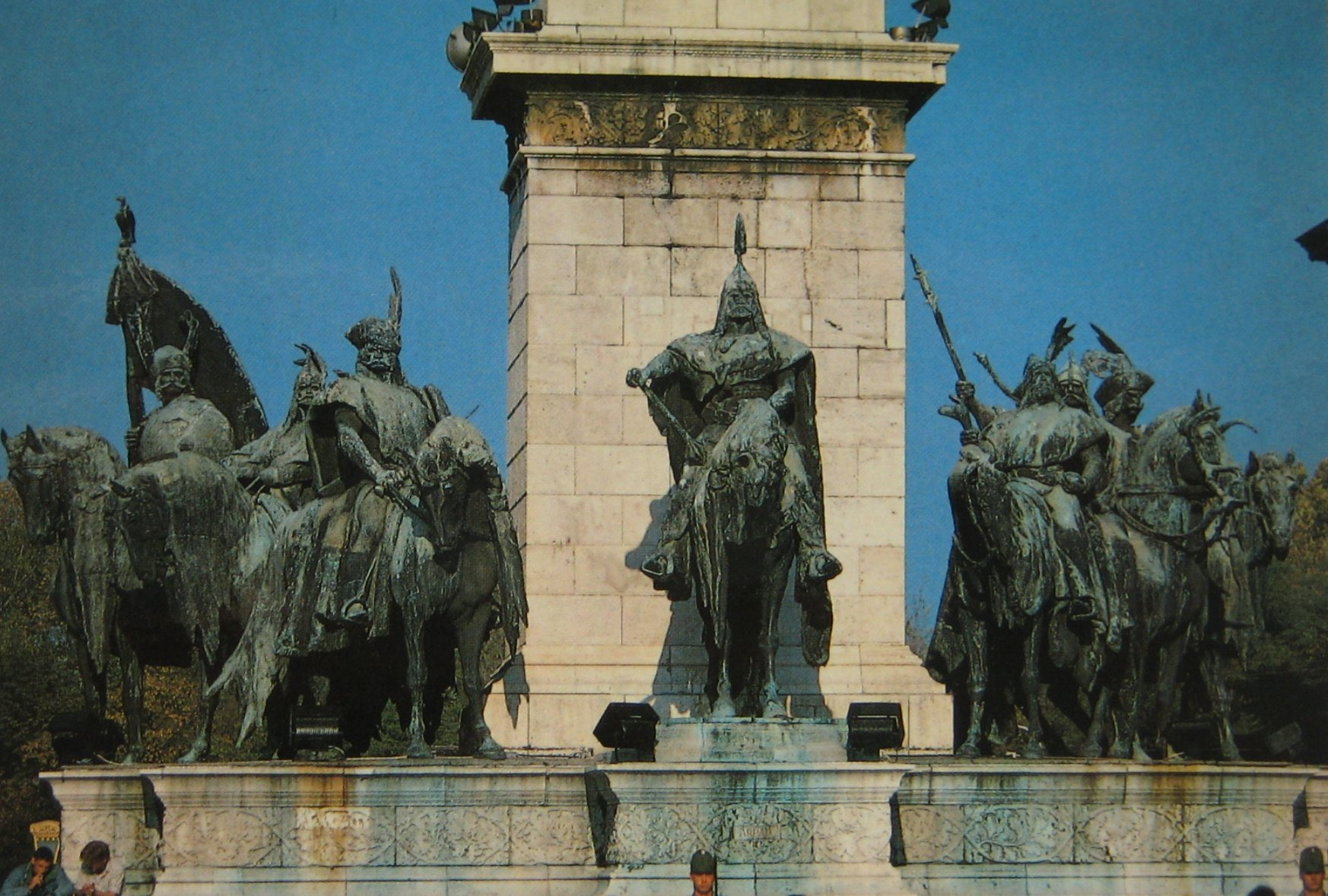 Boedapest